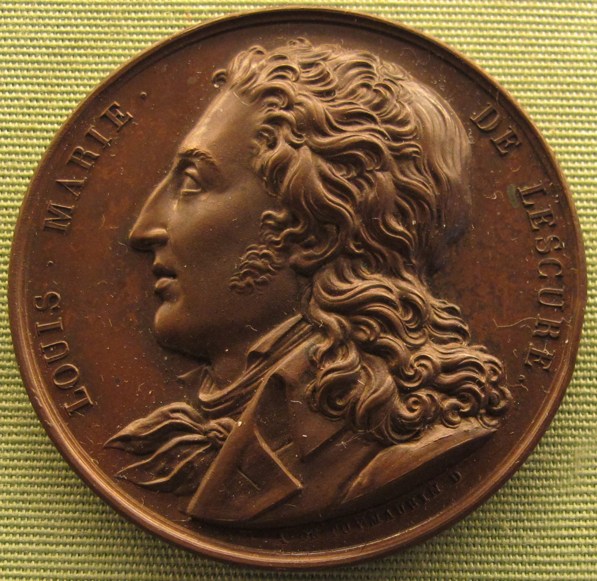 Jean pierre casimir de marcassus, louis marie de lascure, 1824